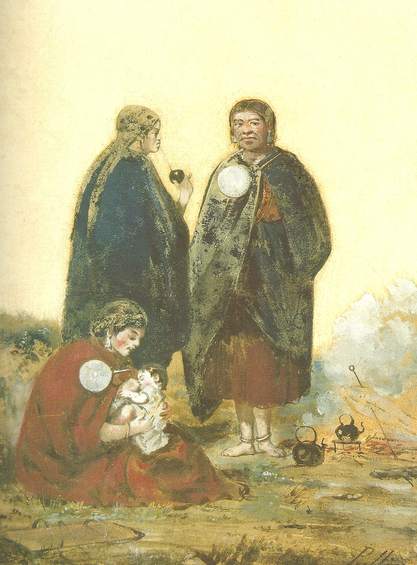 "Indígenas pampas", acuarela sobre papel. Colección particular.